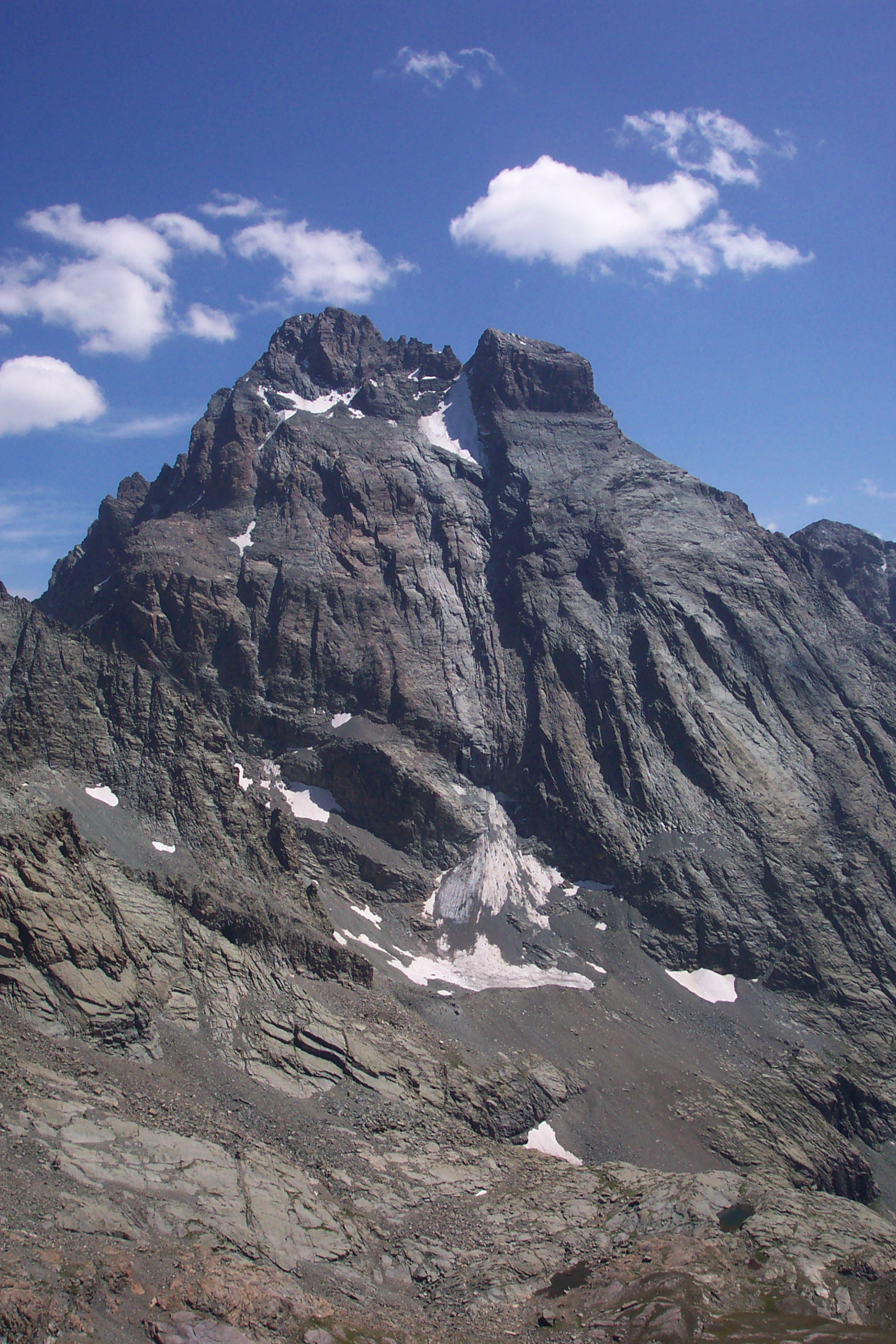 Mont Viso, depuis le col Valente